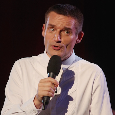 moderátor televizních a rozhlasových pořadů